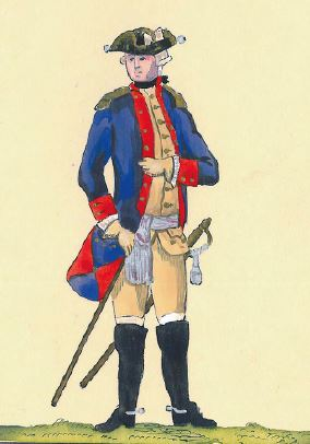 Generał Sztabowy lub Adiutant Wysokiej Generalicji (Mundur oficera sztabu generalnego lub adiutantów wyższej generalicji)